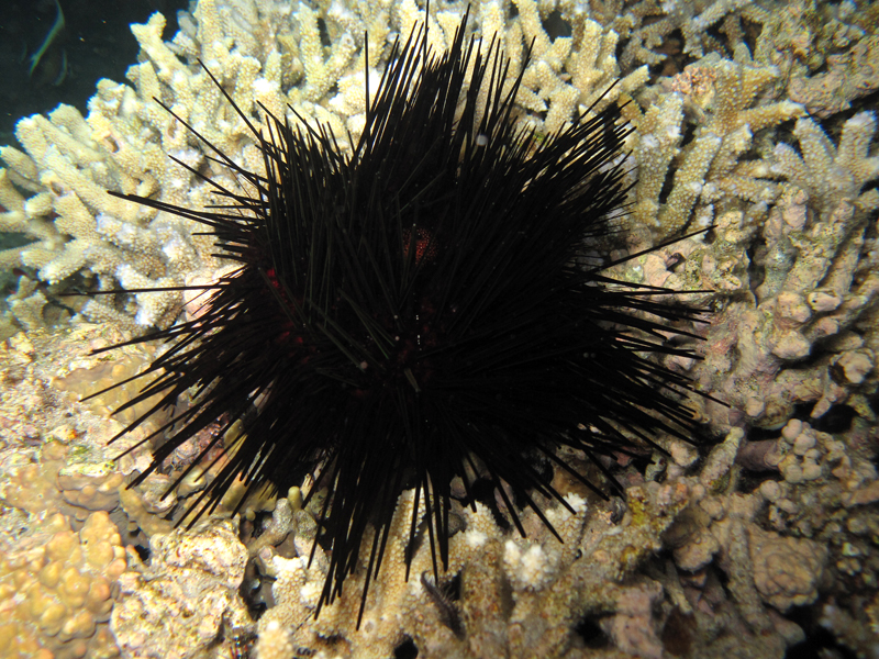 Un oursin à double-piquants (Echinothrix calamaris) en forme noire à la Réunion.